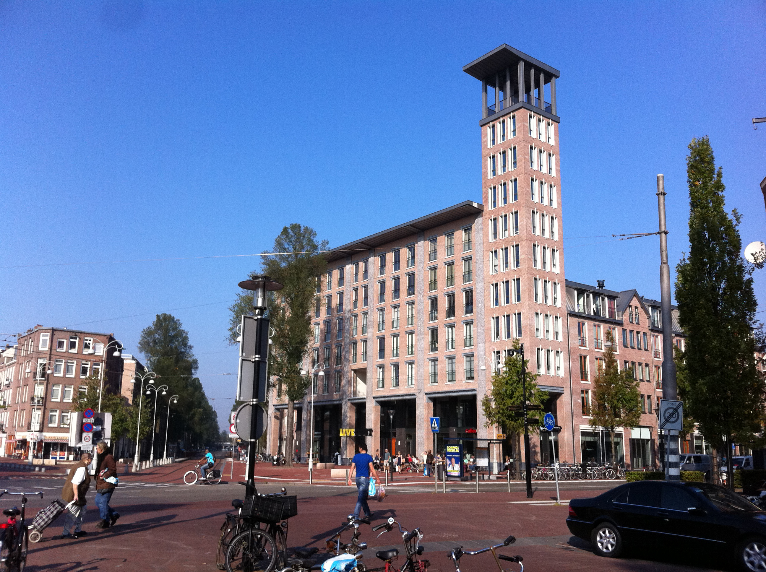 foto genomen vanaf het javaplein